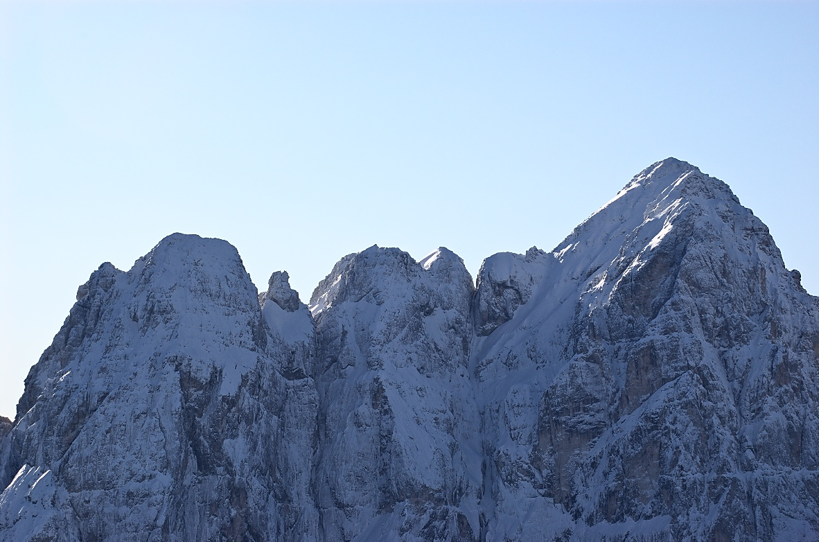 Gruppo del Jof Fuart